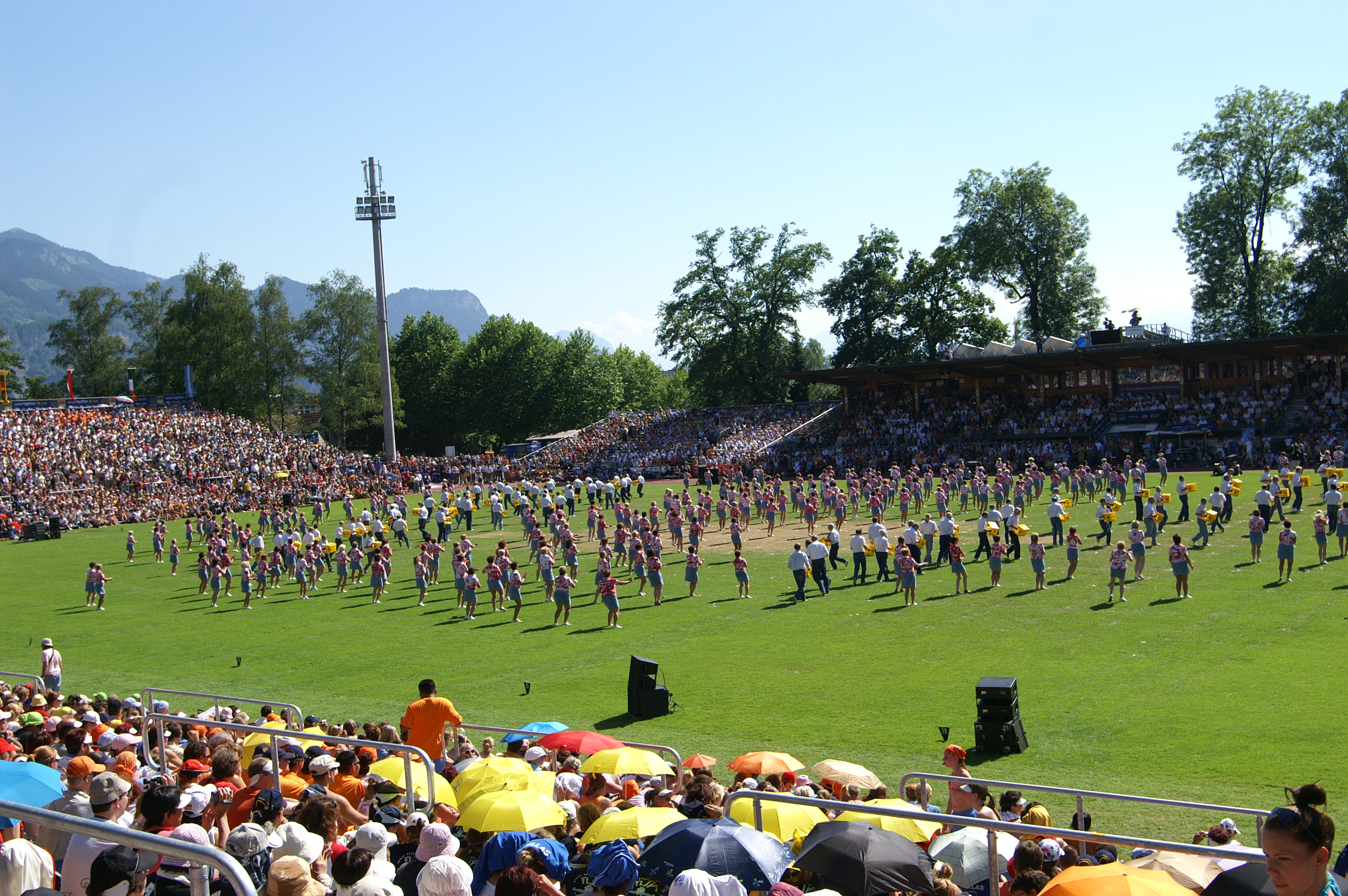 Dornbirn, Abschlussfeier der Weltgymnaetrada 2007 im Stadion „Birkenwiese“. Nation ?????????? Hilfe